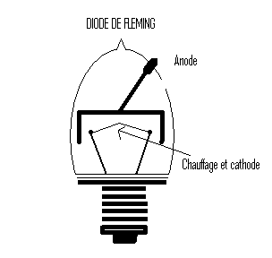 Schéma diode de flemming